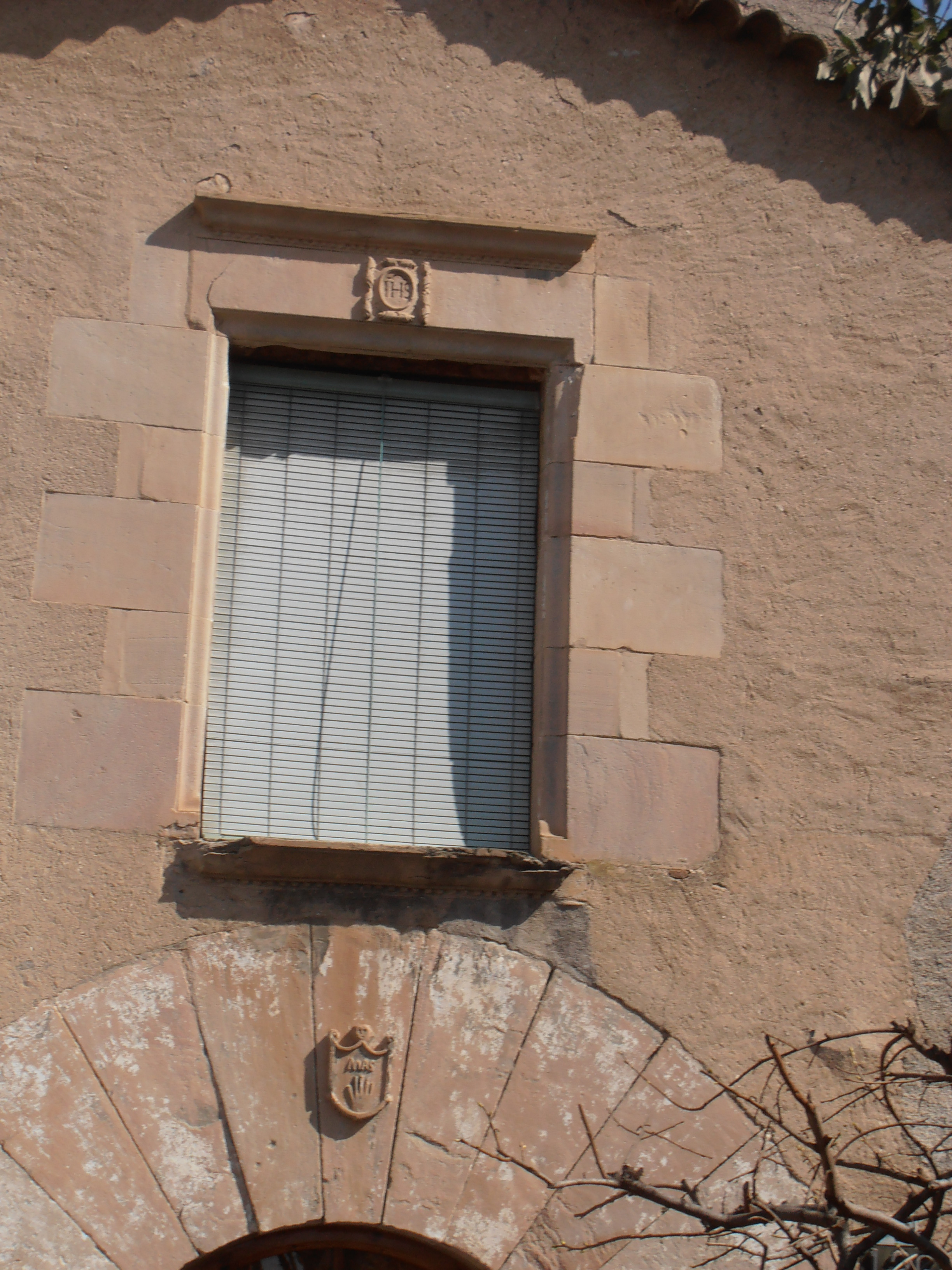 Can Carreter (finestra)